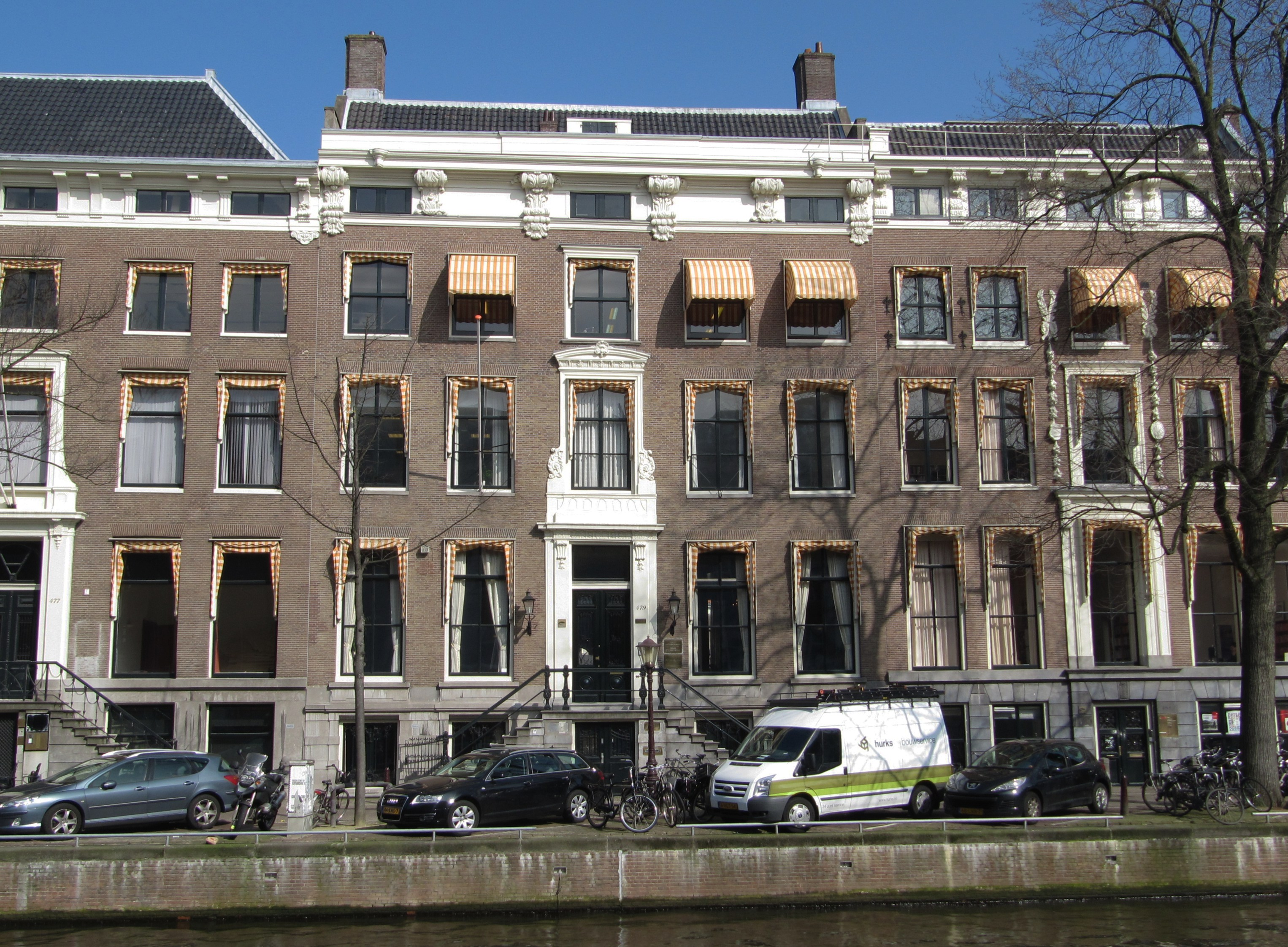 RM1653 Herengracht 479.jpg